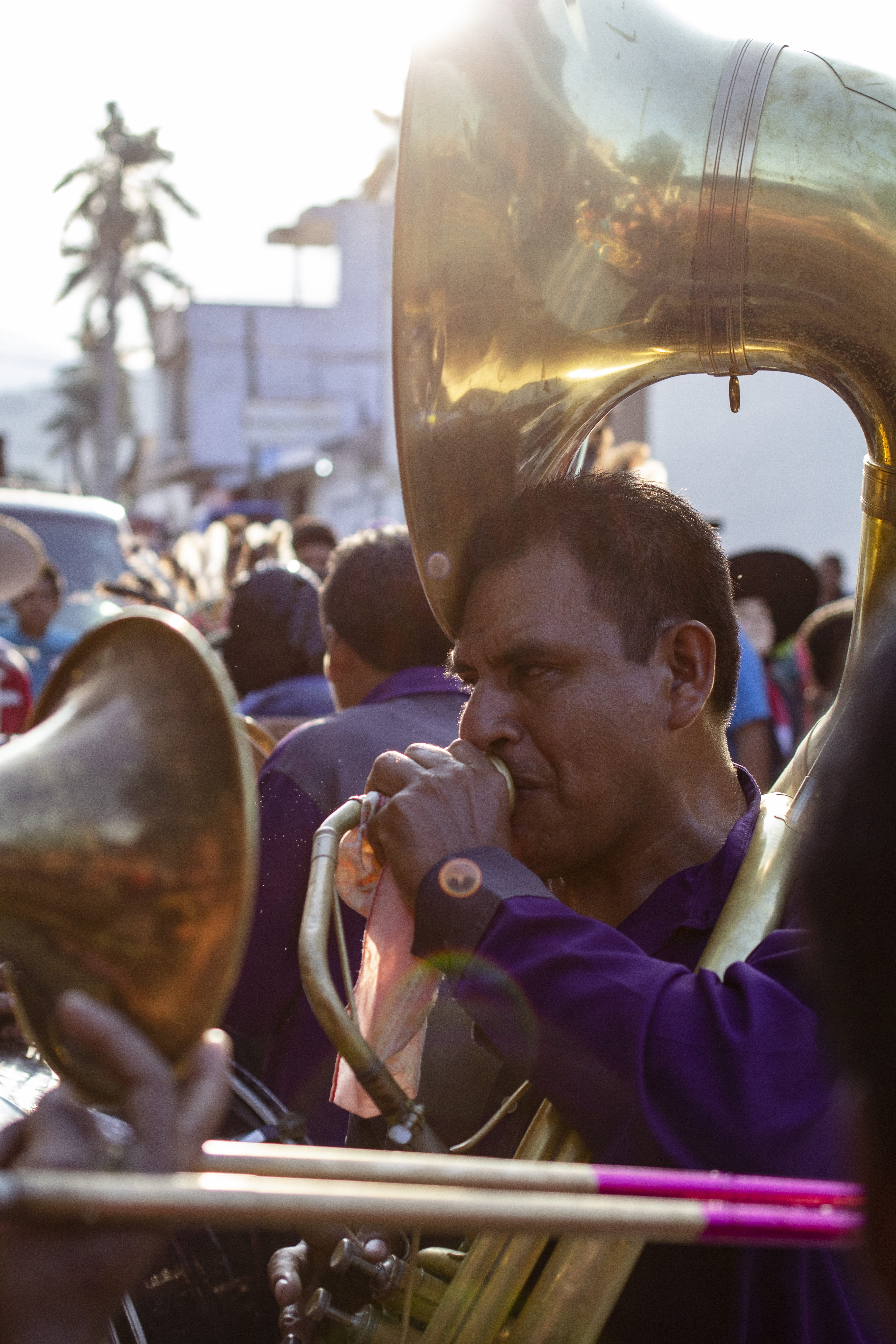 El Xantolo es la celebración huasteca del Día de muertos. Durante las fiestas, las personas salen a las calles disfrazadas a menudo acompañadas de fuegos pirotécnicos y bandas de vientos y tambora tras de ellas. Esta imagen fue tomada en la ciudad de Huejutla, Hidalgo